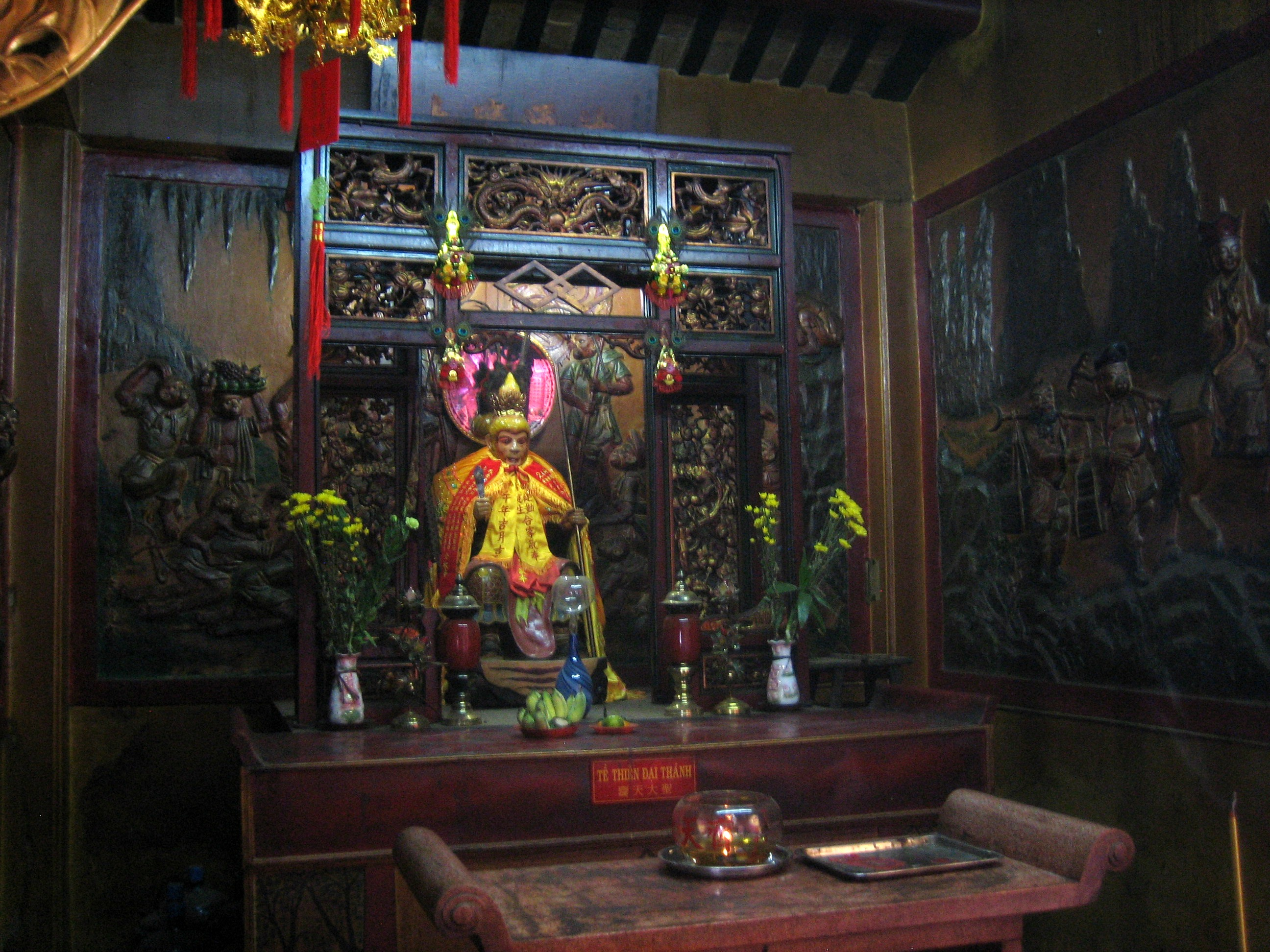 Sun Wukong shrine at Thiên Hậu Temple in Saigon